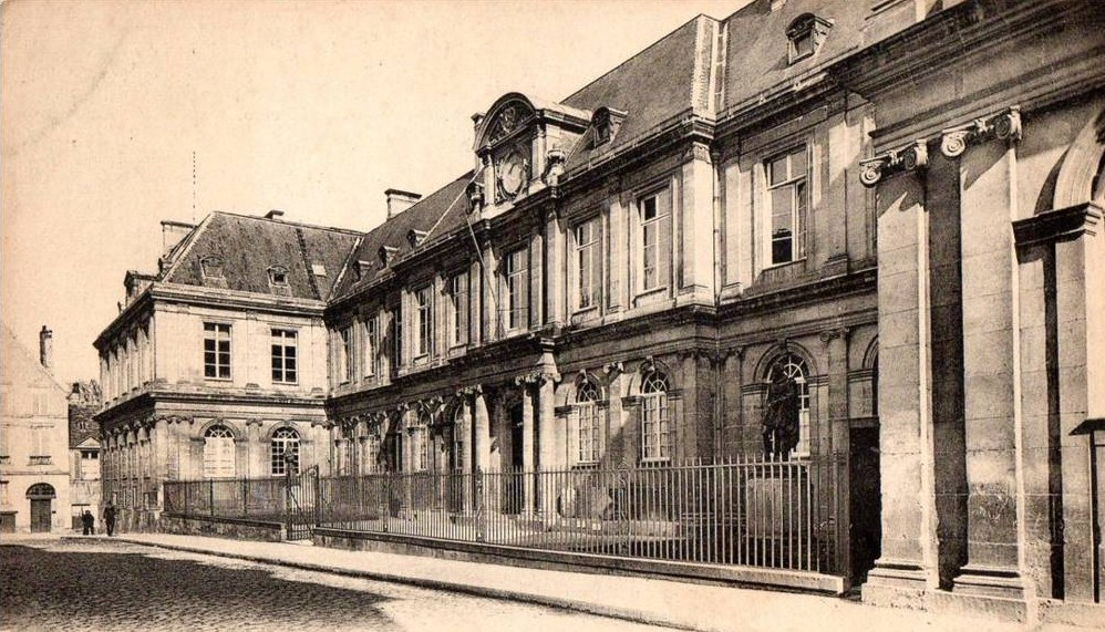 Palais des facultés de Caen, cour sur la rue Pasteur.